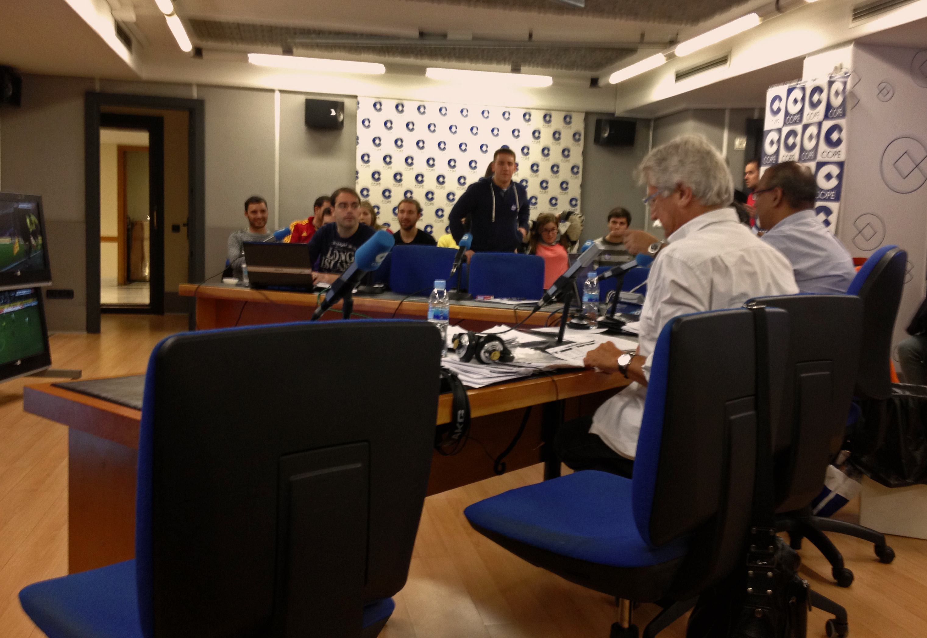 Emisión del programa Tiempo de juego, de la cadena COPE (España)